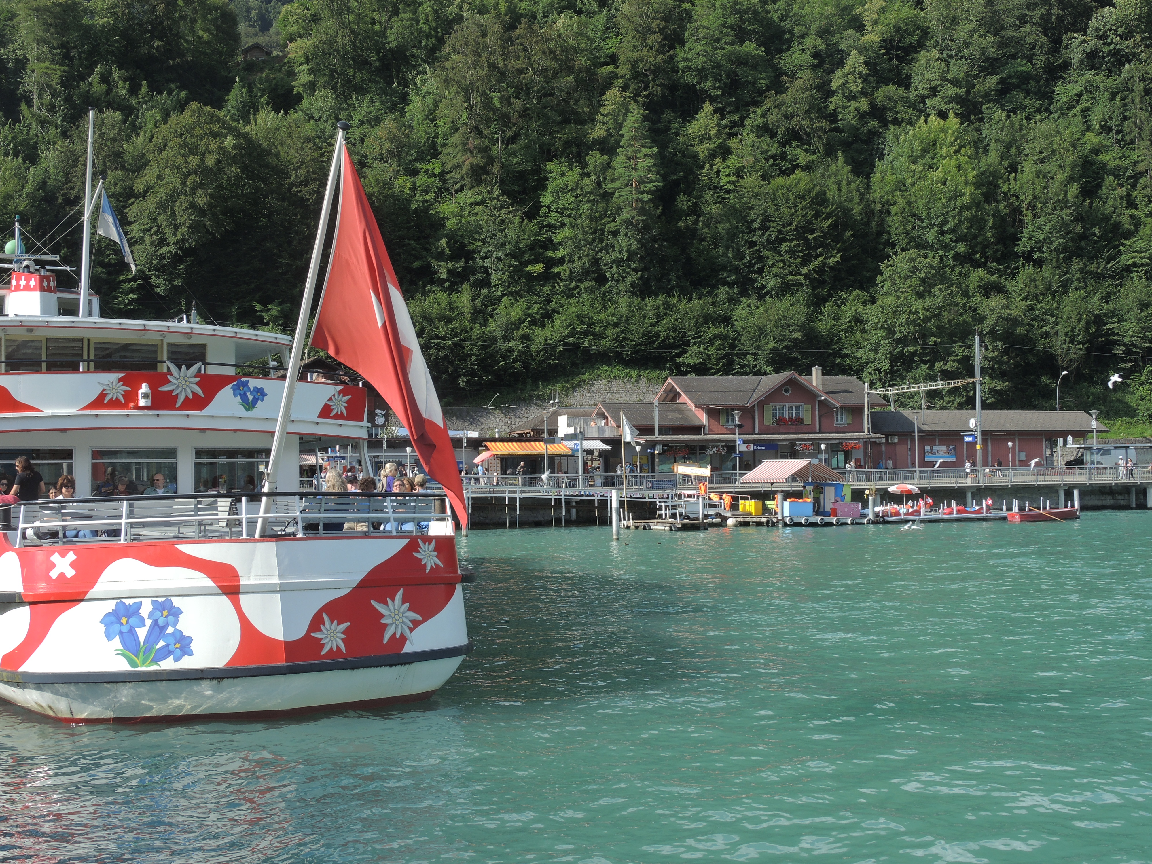 Brienz on Brienzersee lake shore in Switzerland